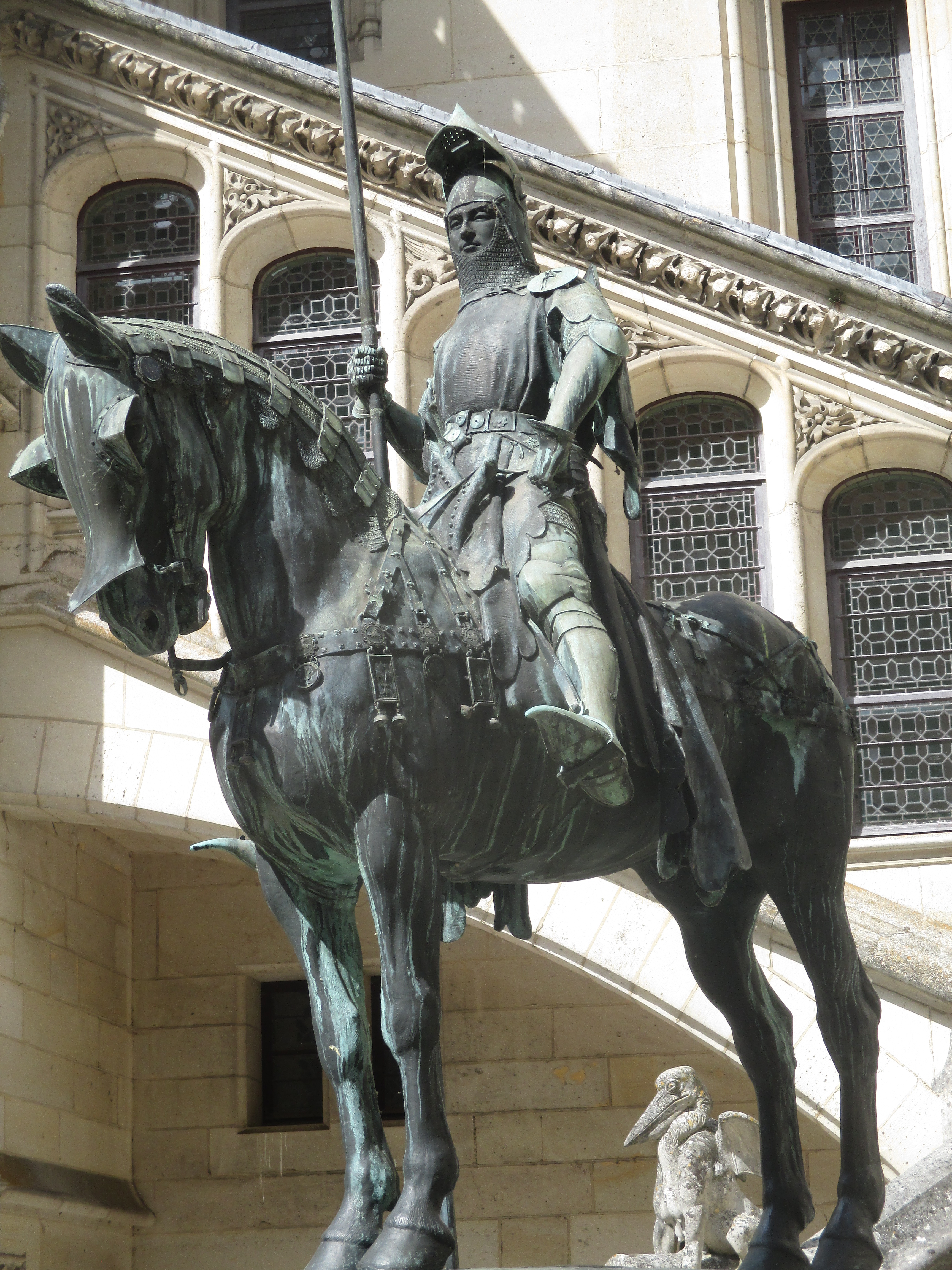 Statue équestre de Louis d'Orléans (par Frémiet) dans la cour du château de Pierrefonds.